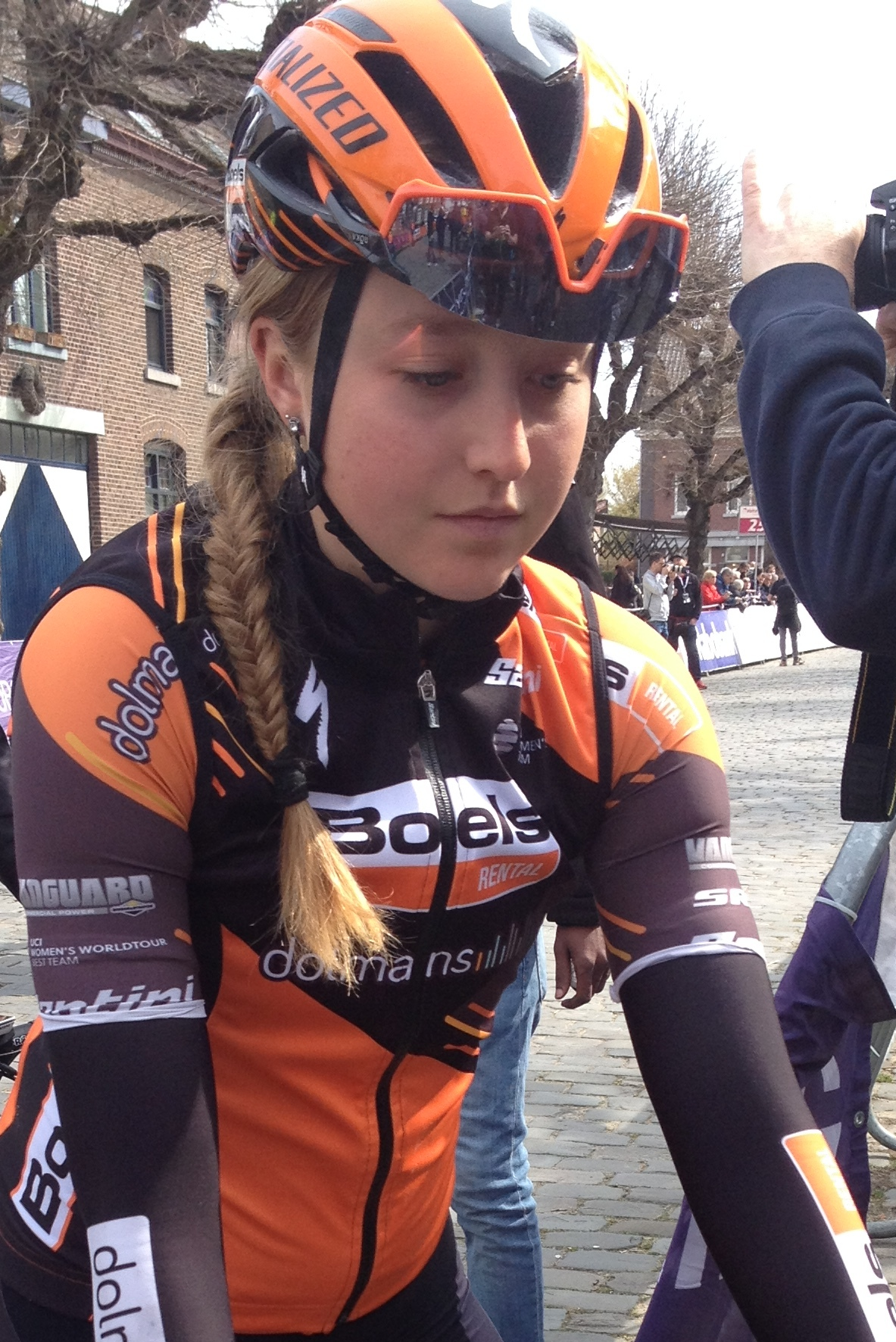 Volta Limburg Classic 2019 voor vrouwen met start en finish in Eijsden, Limburg, Nederland